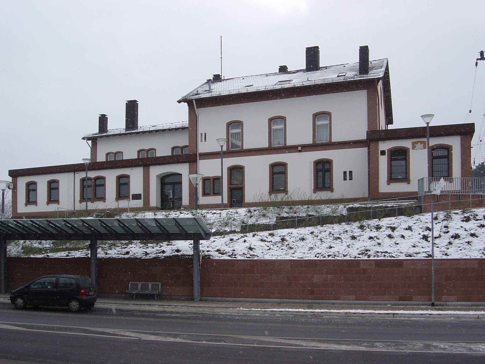 Bahnhof Bexbach, Bahnhofstraße, 66450 Bexbach